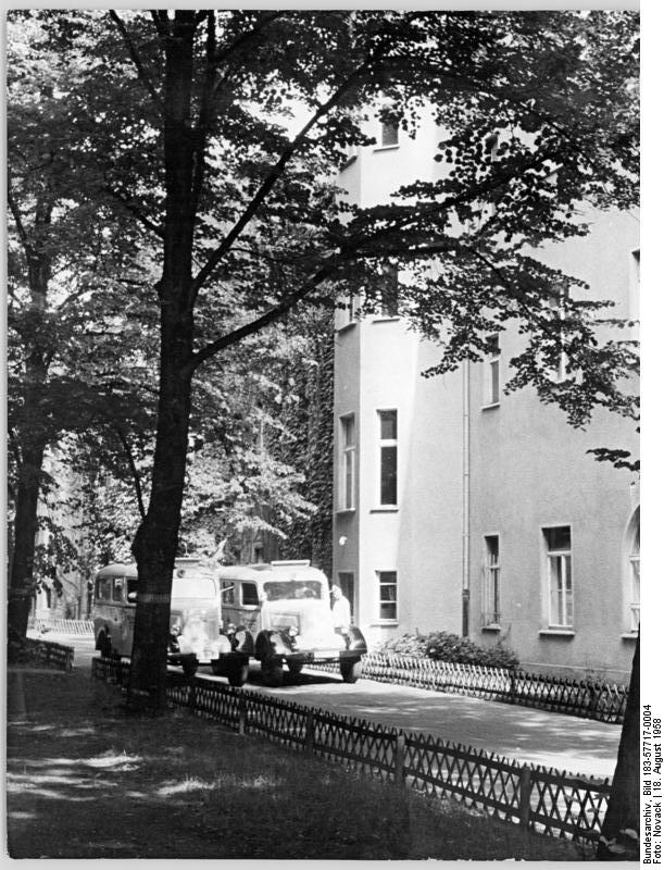 Berlin-Weißensee, städtisches Krankenhaus Zentralbild Novack 18.8.1958 Öffentliche Gebäude des demokratischen Berlin - UBz: Städtisches Krankenhaus in Berlin-Weissensee, Schönstrasse